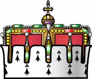 Erzherzogs Coronet